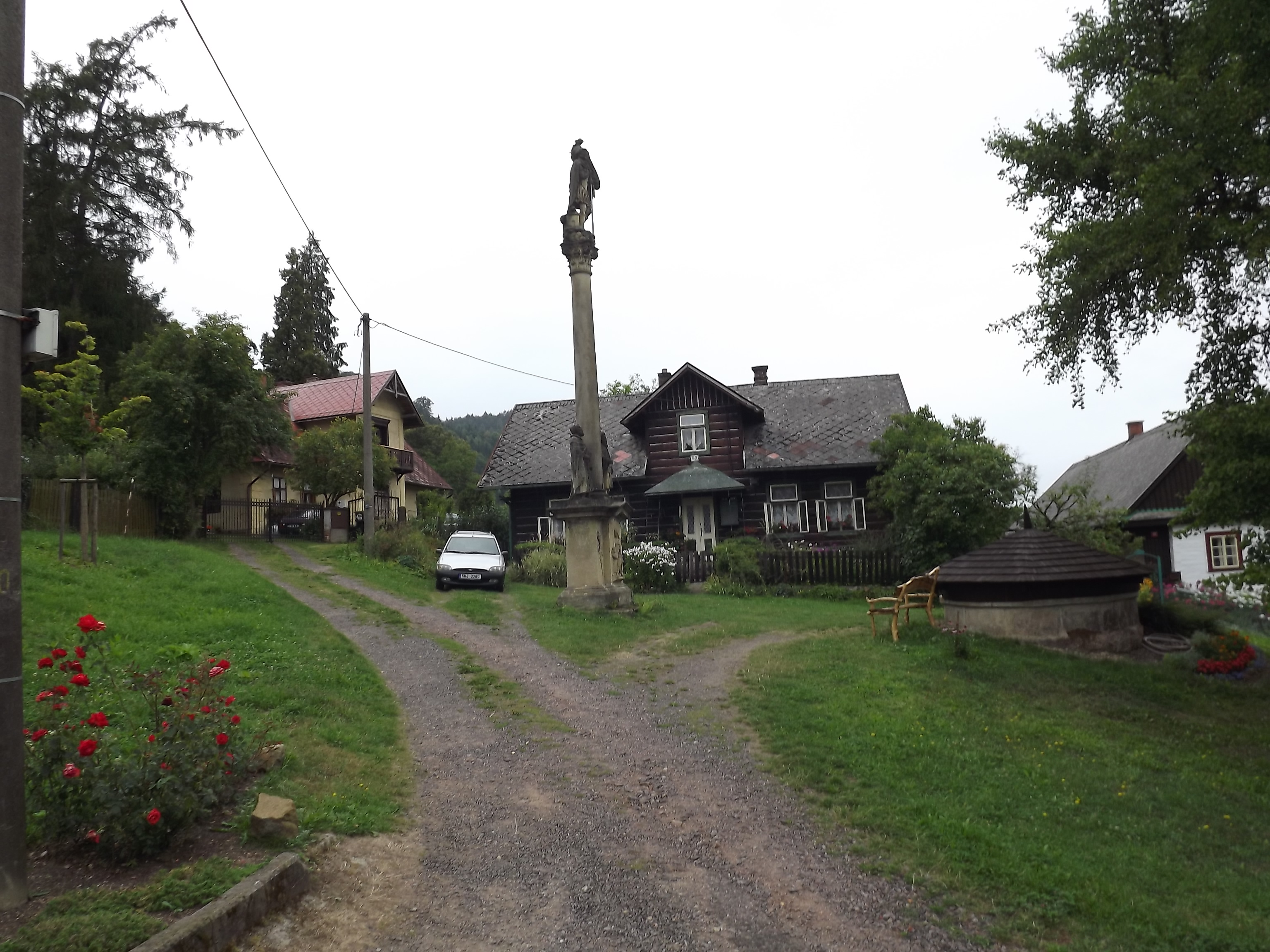 POtštejn